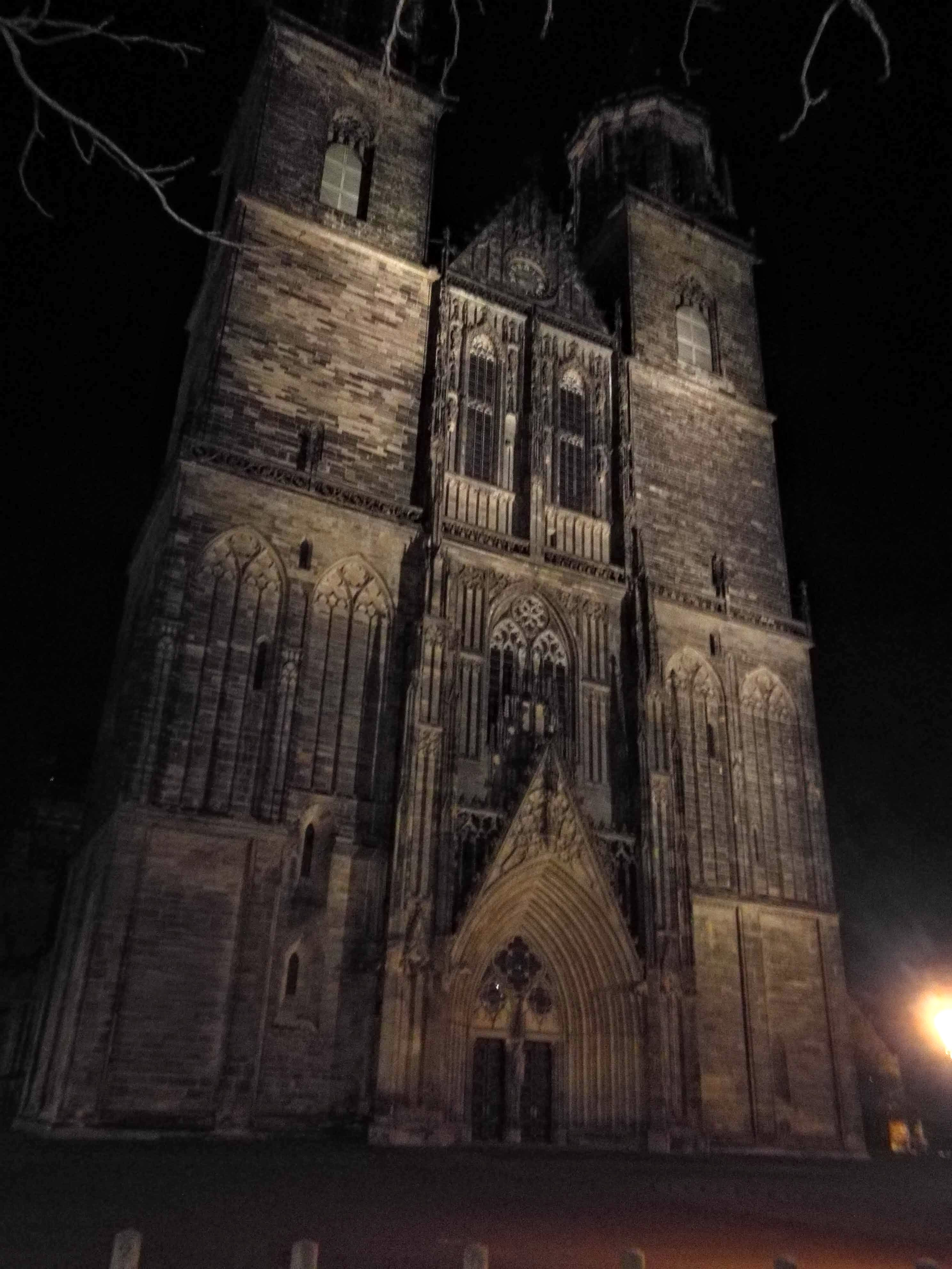 Magdeburský dóm